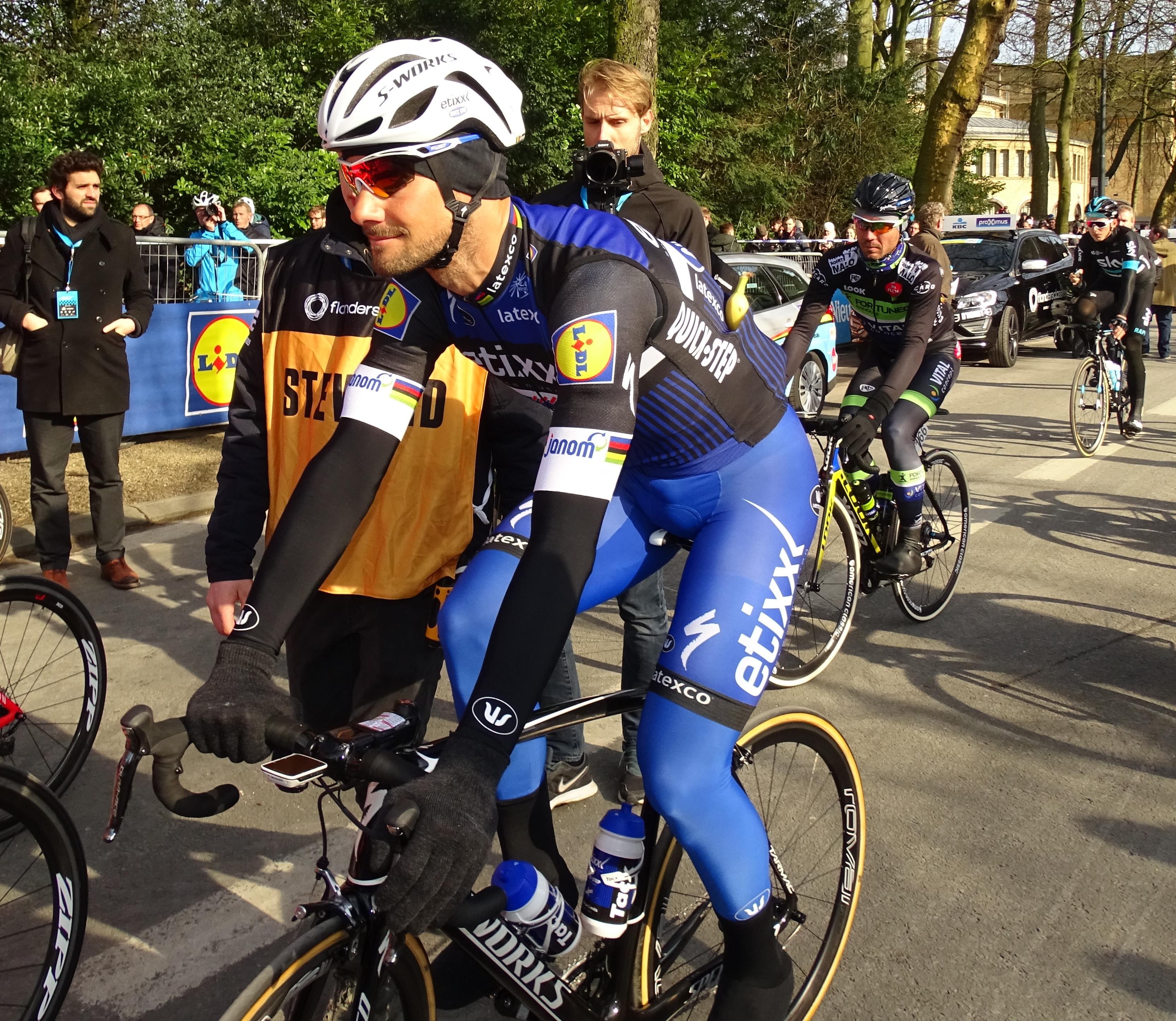 Reportage réalisé le samedi 27 février à l'occasion du départ et de l'arrivée du Circuit Het Nieuwsblad 2016 et de l'arrivée du Circuit Het Nieuwsblad féminin 2016 à Gand, Belgique.